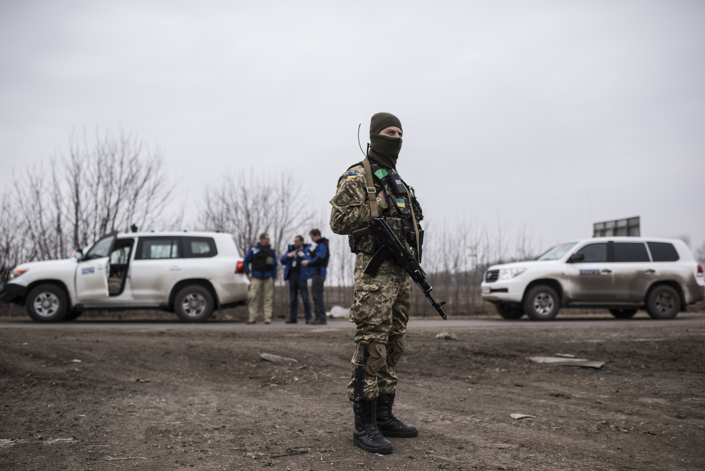 March, 2015